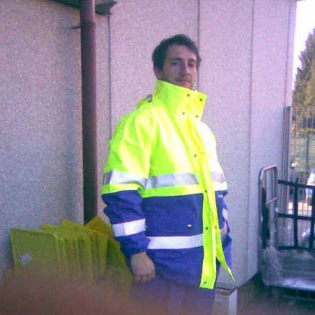 a post man in italy